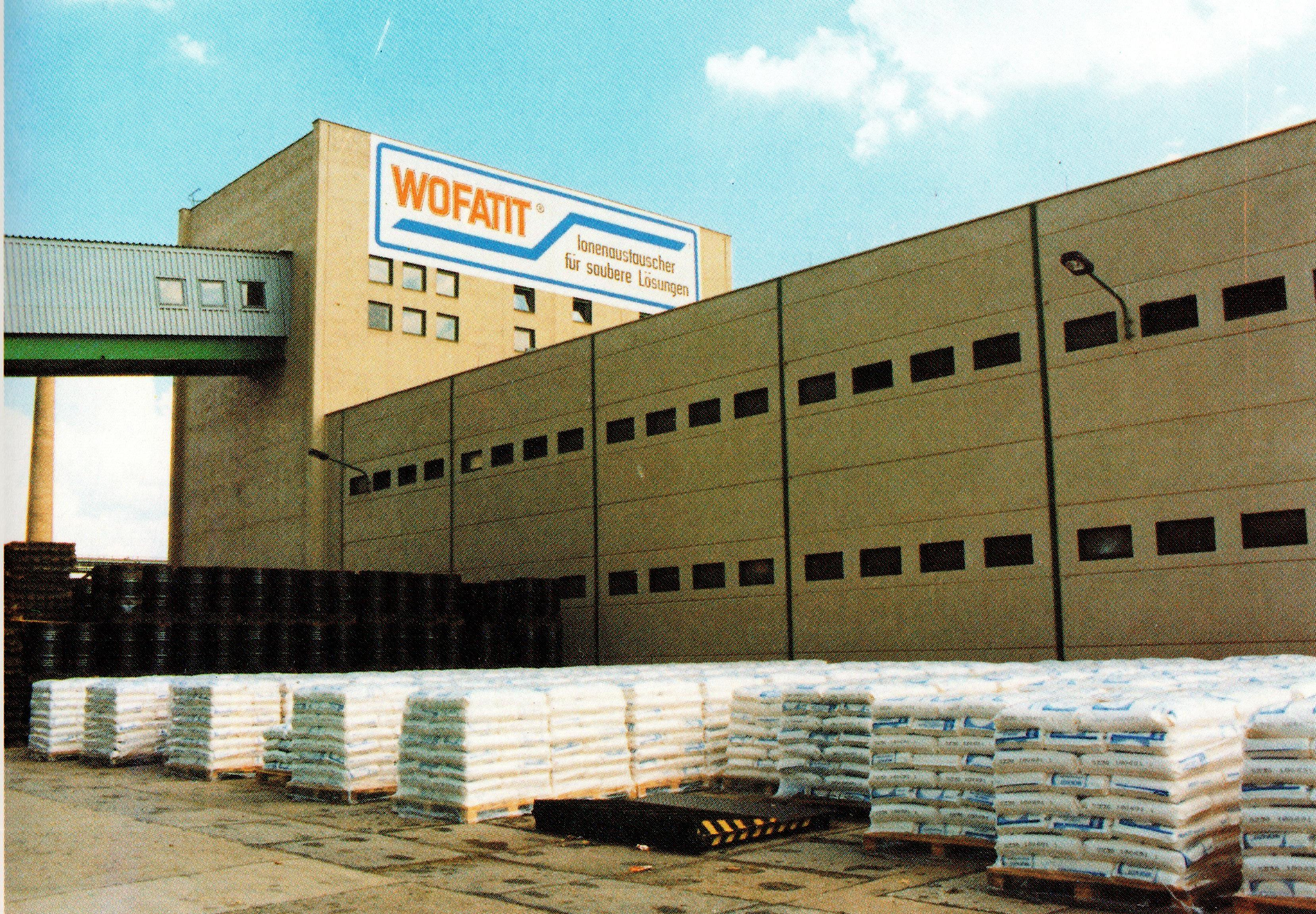 Ionenaustauscher WOFATIT aus der Farbenfabrik Wolfen-Bitterfeld